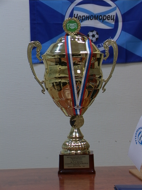 Кубок футбольного круга города Новороссийск